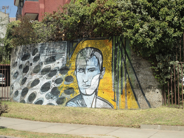 Obra de Benjamín Lira, reproducida por Claudio Francia en calle Diego Portales.